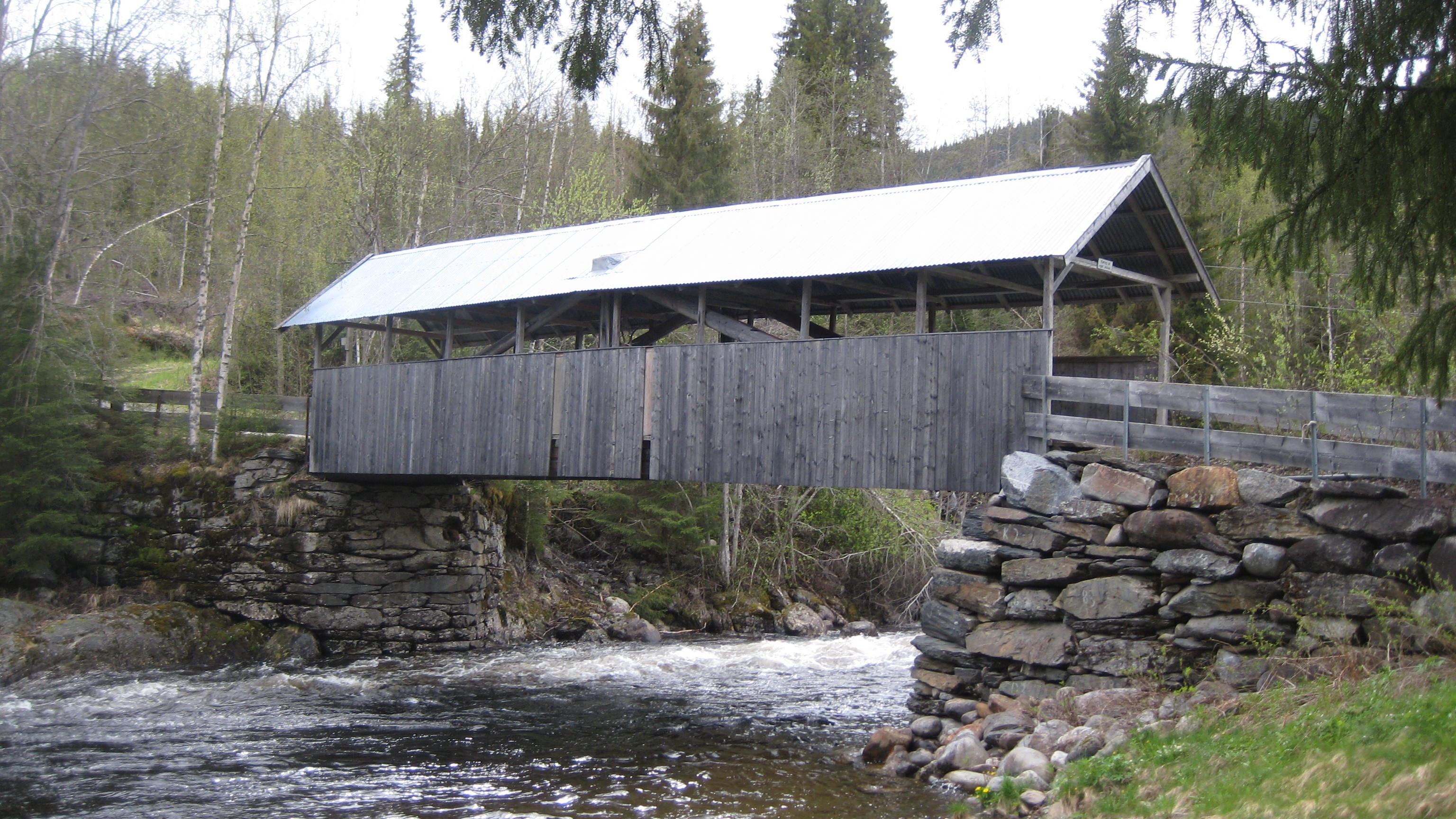 Flattum bru mellom Vest-Torpa og Nord-Torpa